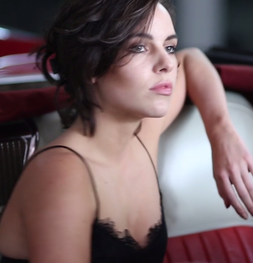 Luciana Echeverría en sesión de fotos para Revista SML en 2014